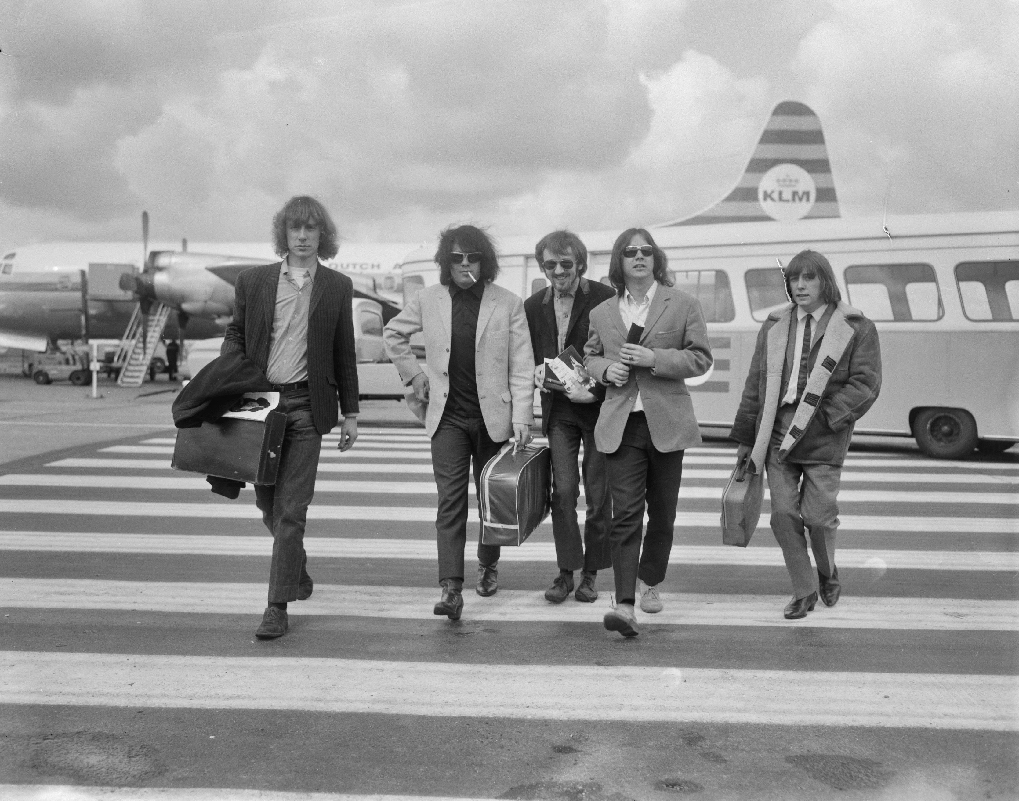 Aankomst Pretty Things (beatgroep) op Schiphol, v.l.n.r Brian Pendleton (rhytmgitarist), John Stax (basgitarist), Dick Taylor (sologitarist), Phil May (zang en harmonica), Viv Prince (drummer)